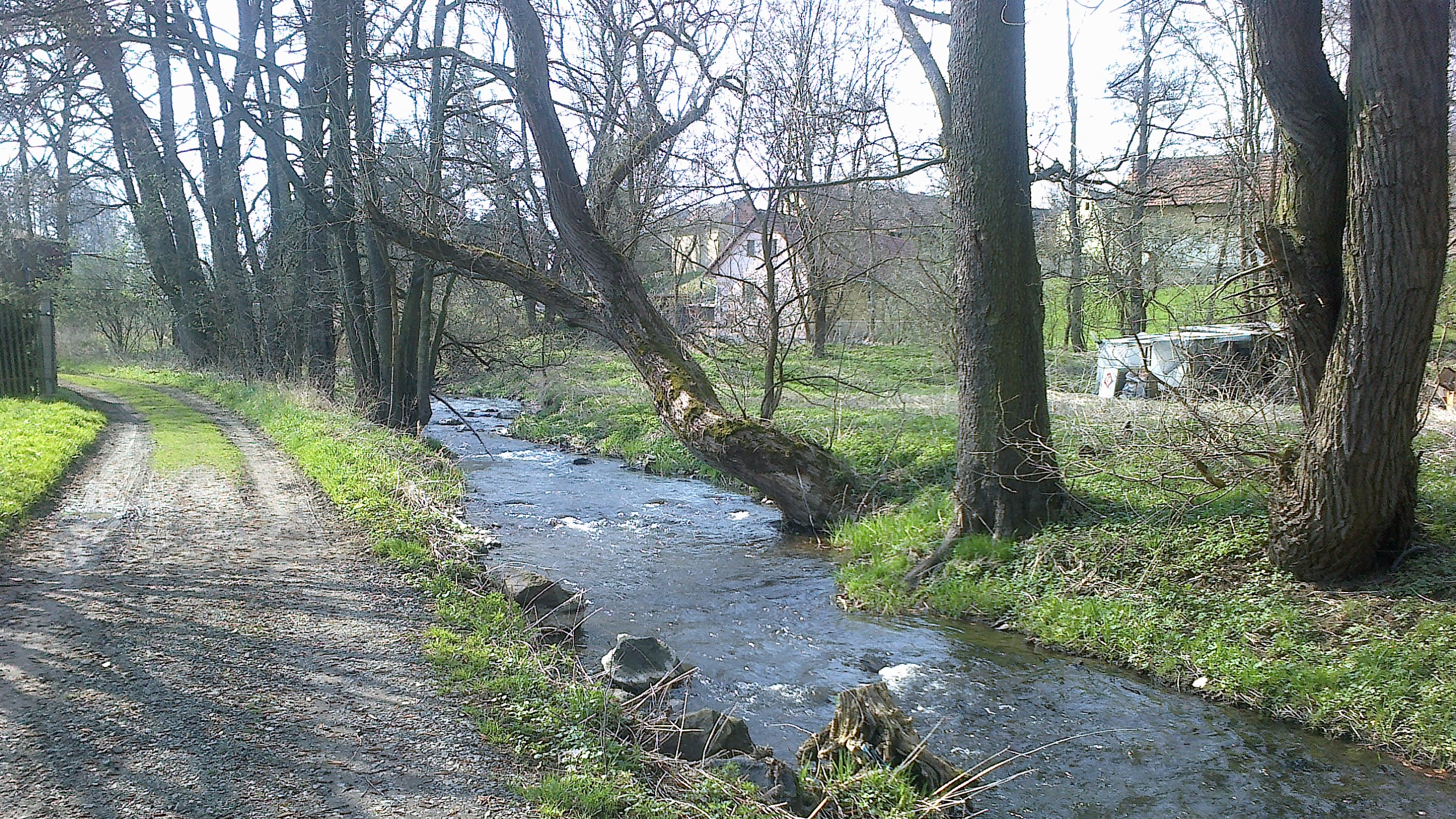 Chocenický potok ve Vlčicích, místní části města Blovice